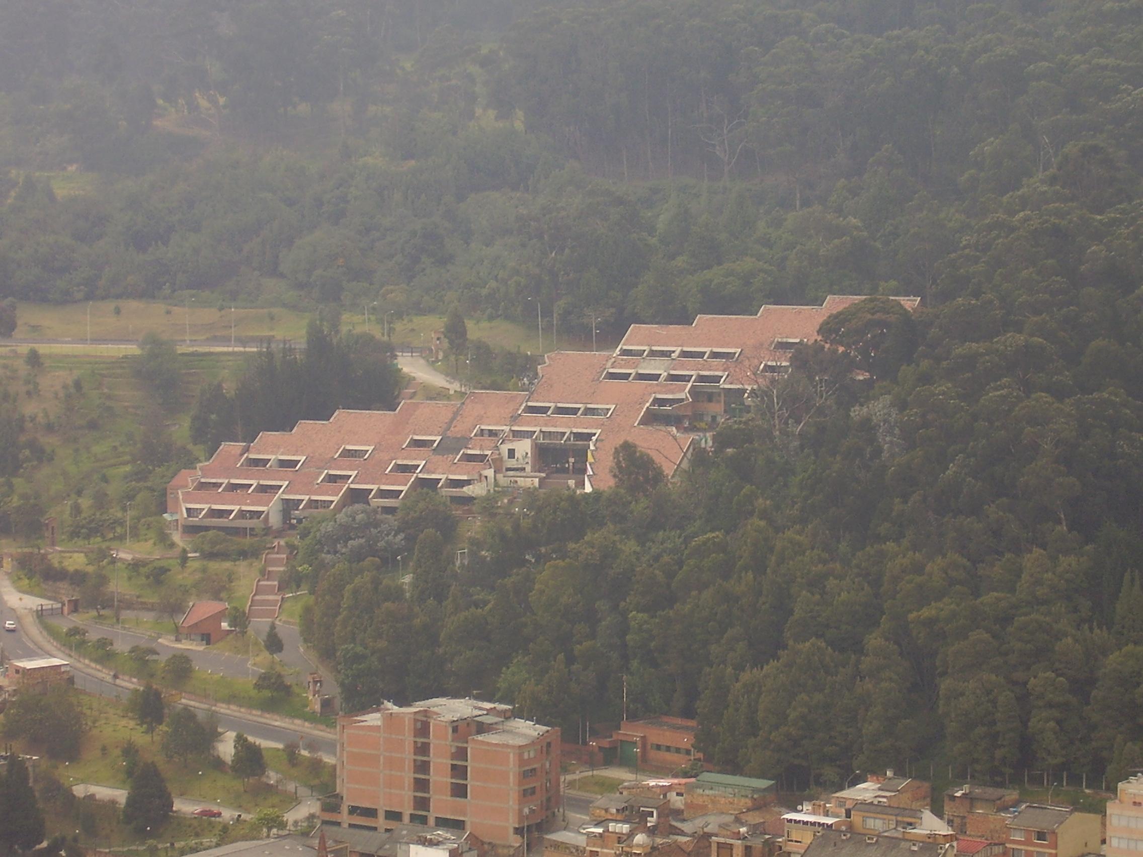 Sede La Macarena de la Universidad Distrital Francisco José de Caldas.